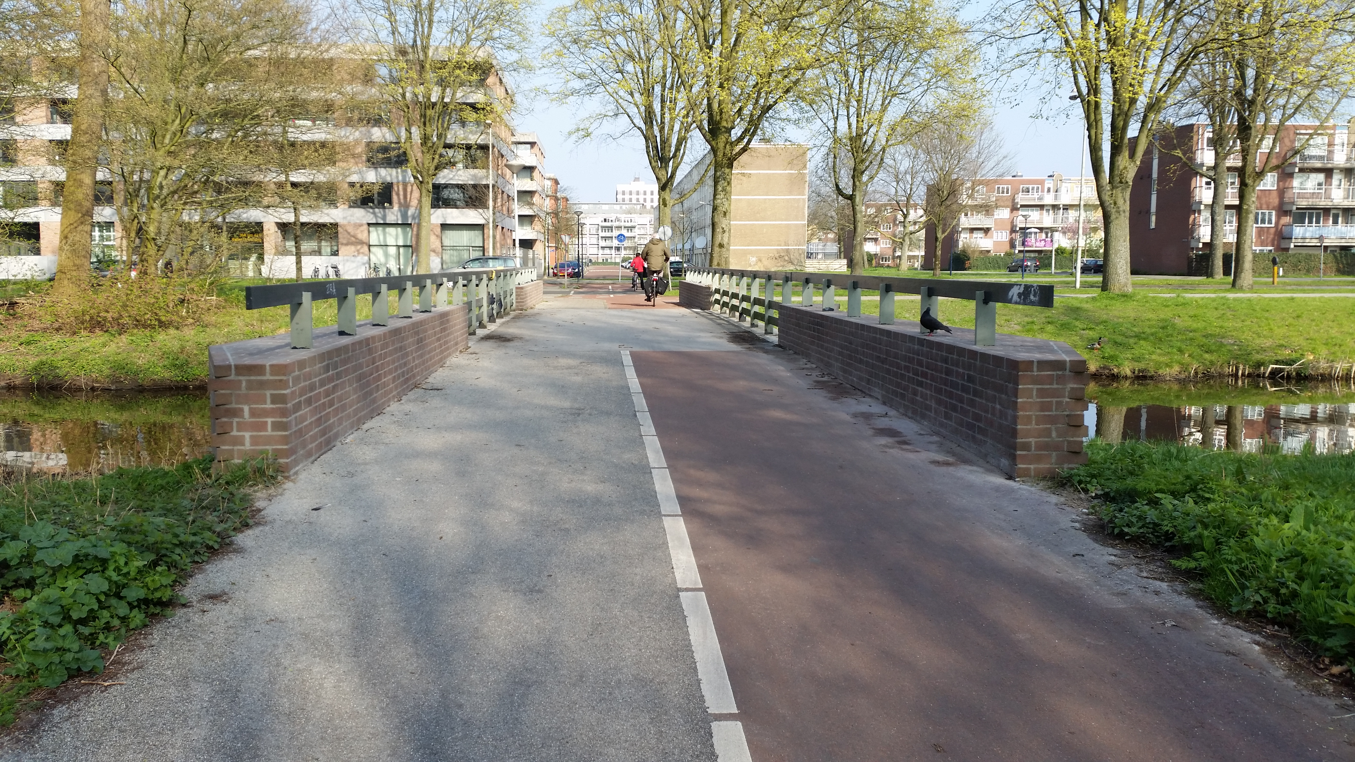 Overzicht over Brug 770 (in Amsterdam)